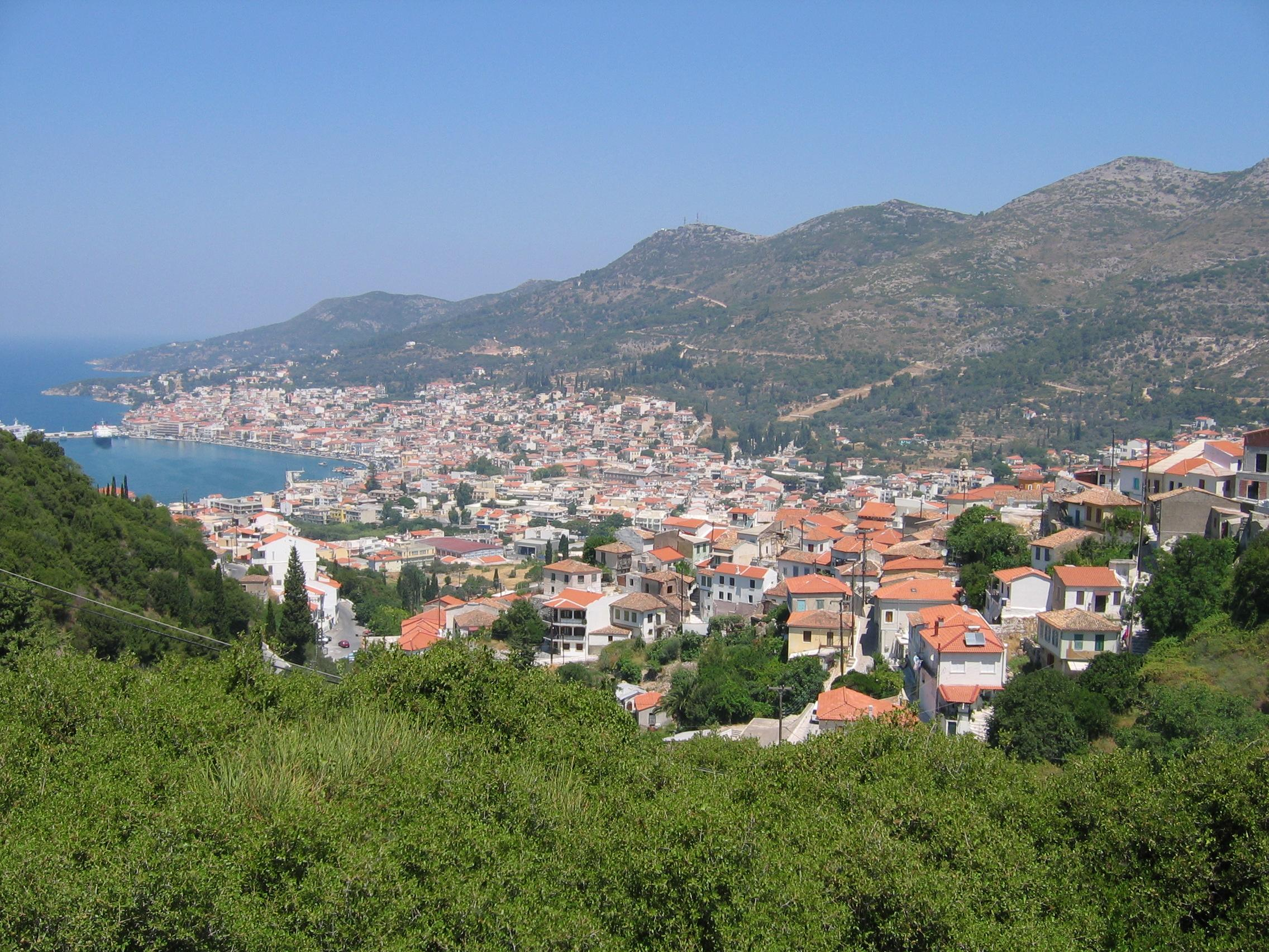 Samos City